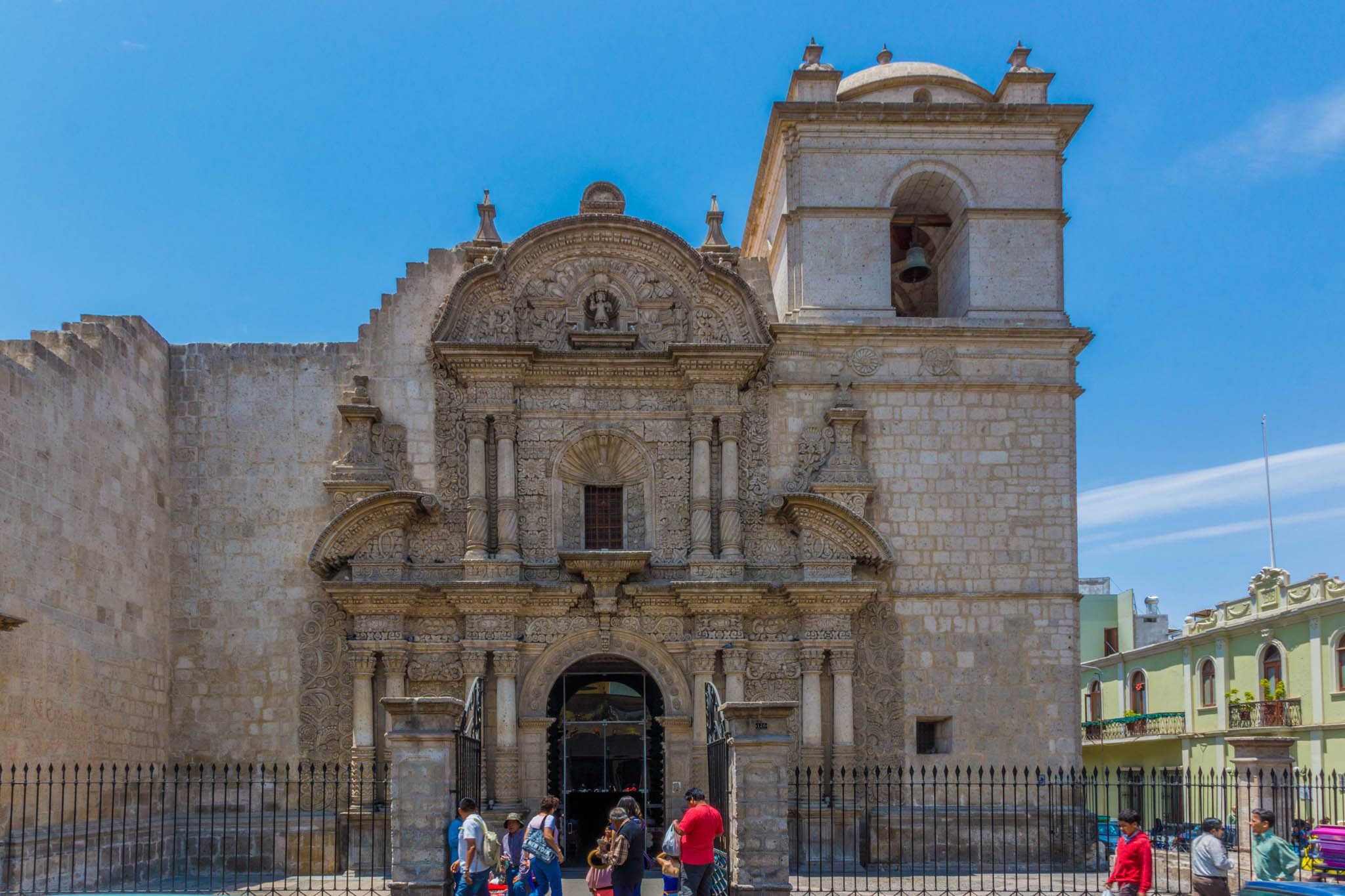 477 Arequipa